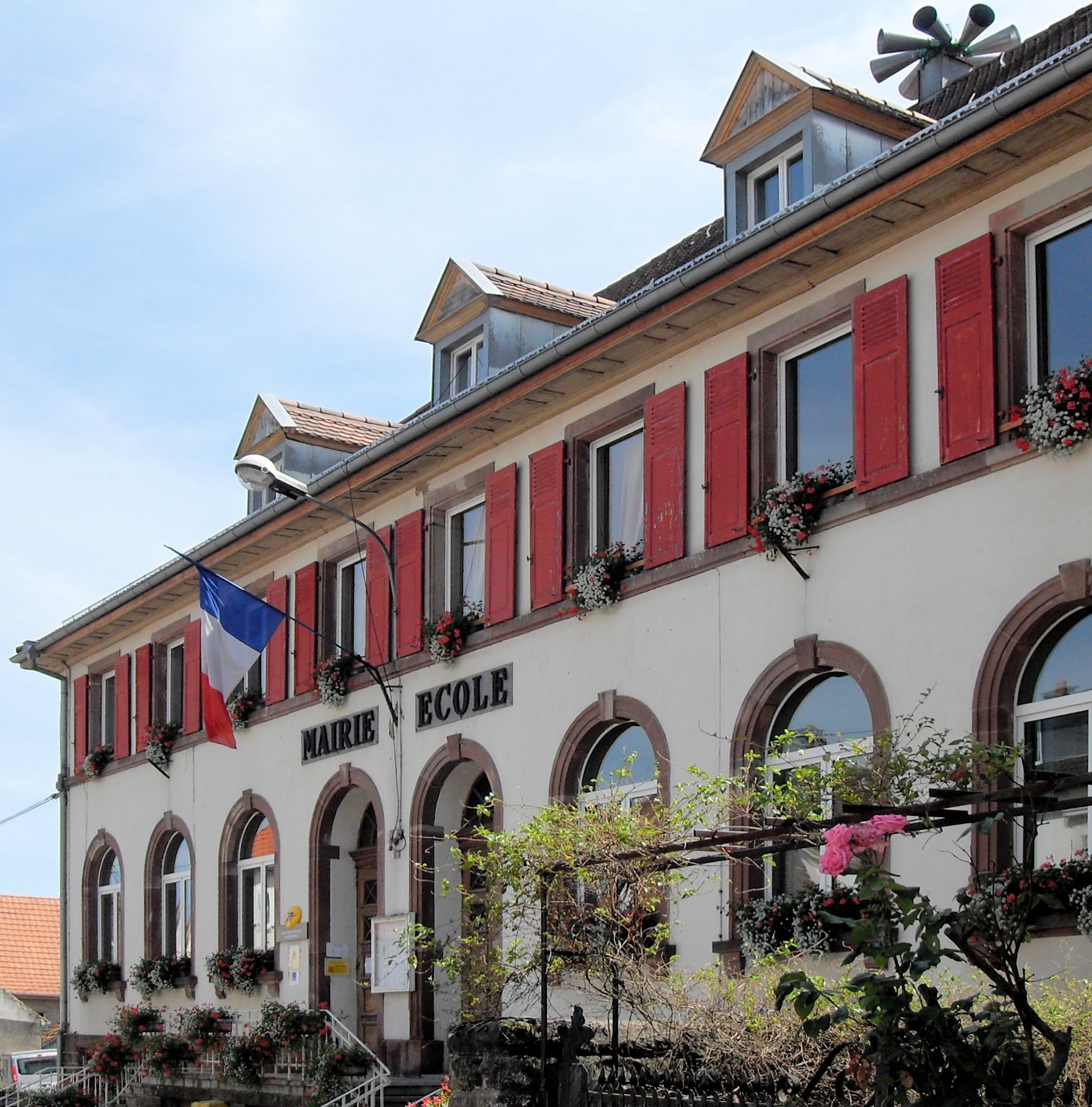 La mairie-école de Steinbach